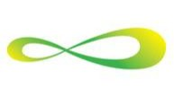 민주통합당 당시 로고